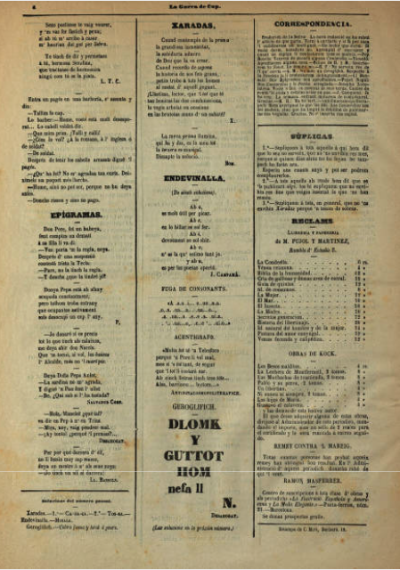 Portada de l'onzè número del setmanari català satíric La Gorra de Cop (2 gener 1876)